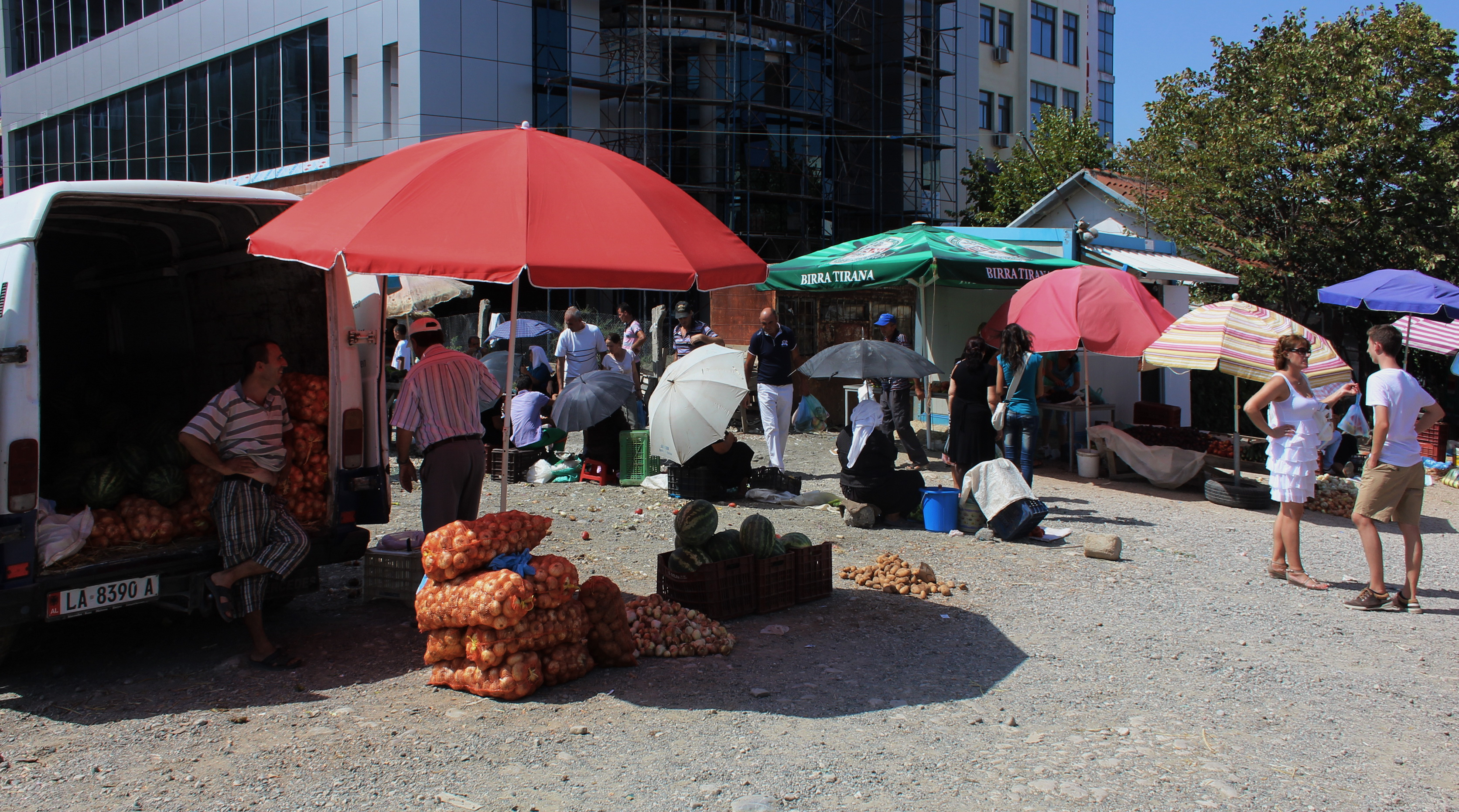 Markt in Laç - Albanien